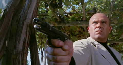 Screenshot dal film Milano calibro 9 di Fernando Di Leo.